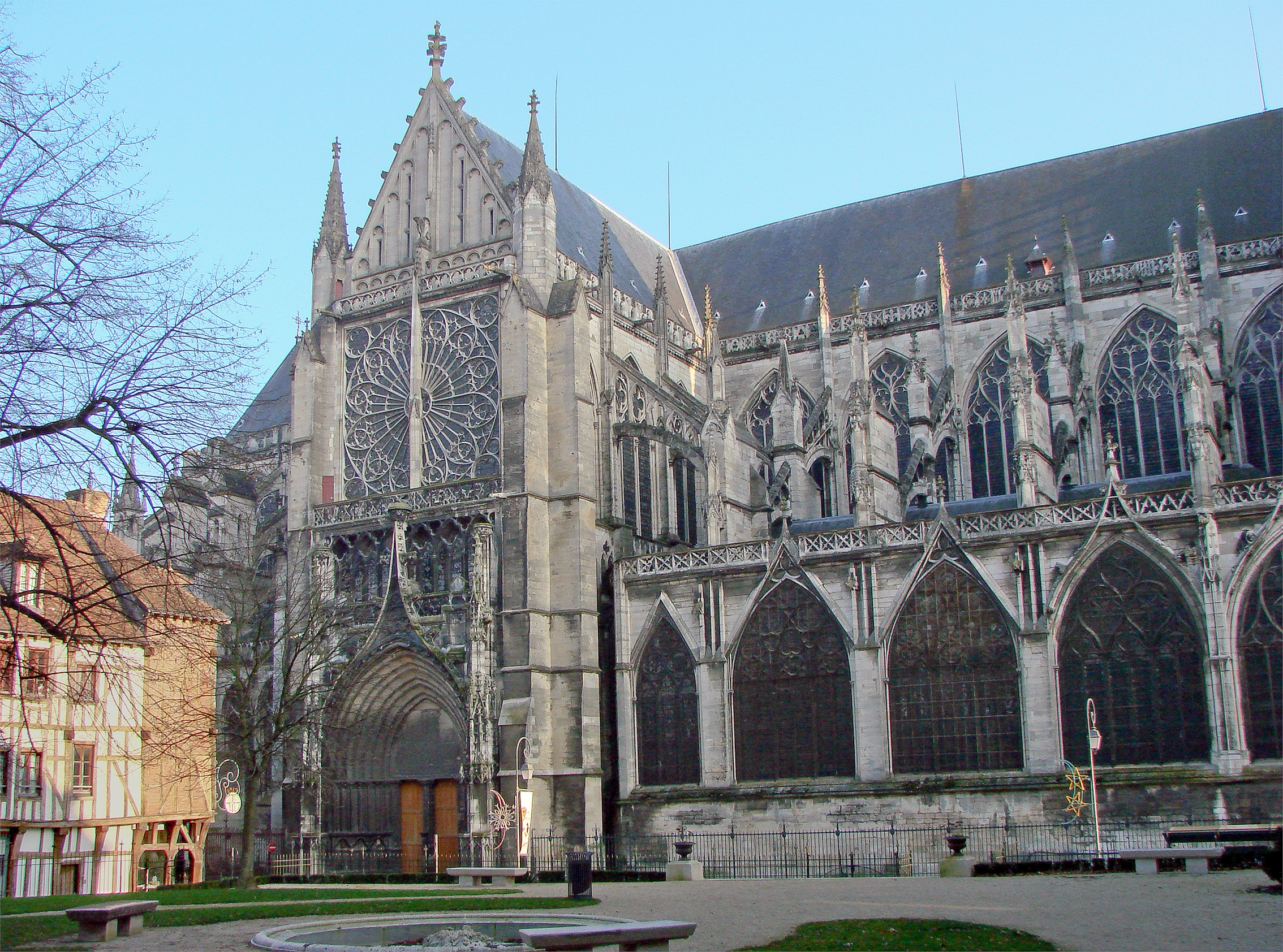 Côté Nord de la cathédrale Saint-Pierre-et-Saint-Paul de Troyes, 13ème siècle.